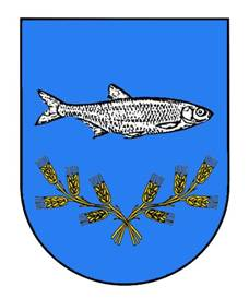 Wielkie Oczy, herb